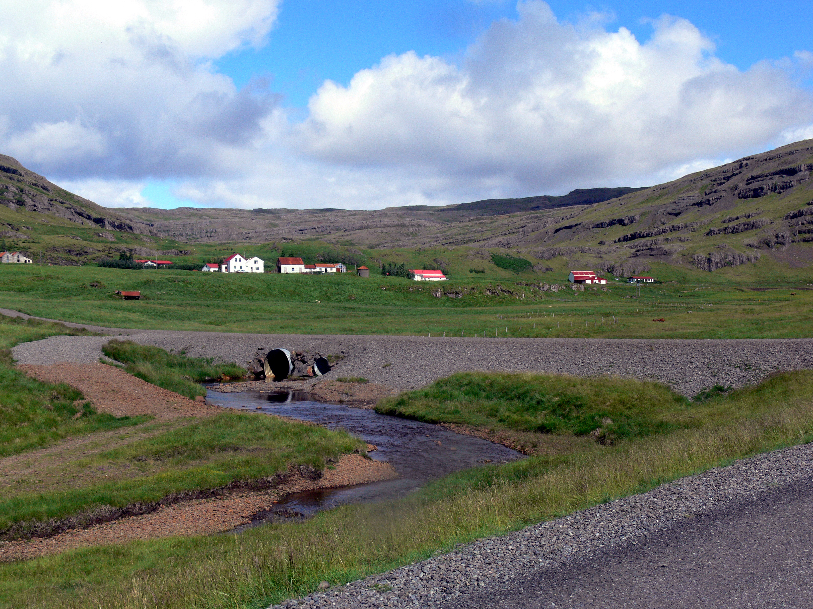 Borgarhöfn. Der Hof gm Südufer von Suðursveit wurde im 16. Jh. von Skriðuklaustur erworben. Es ist archäologisch erwiesen, dass von hier Fisch über den Vatnajökull nach Skriðuklaustur transportiert wurde.